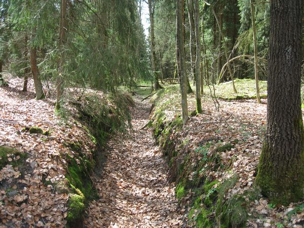 Das trockene Bett der Este kurz oberhalb von Cordshagen im April 2010